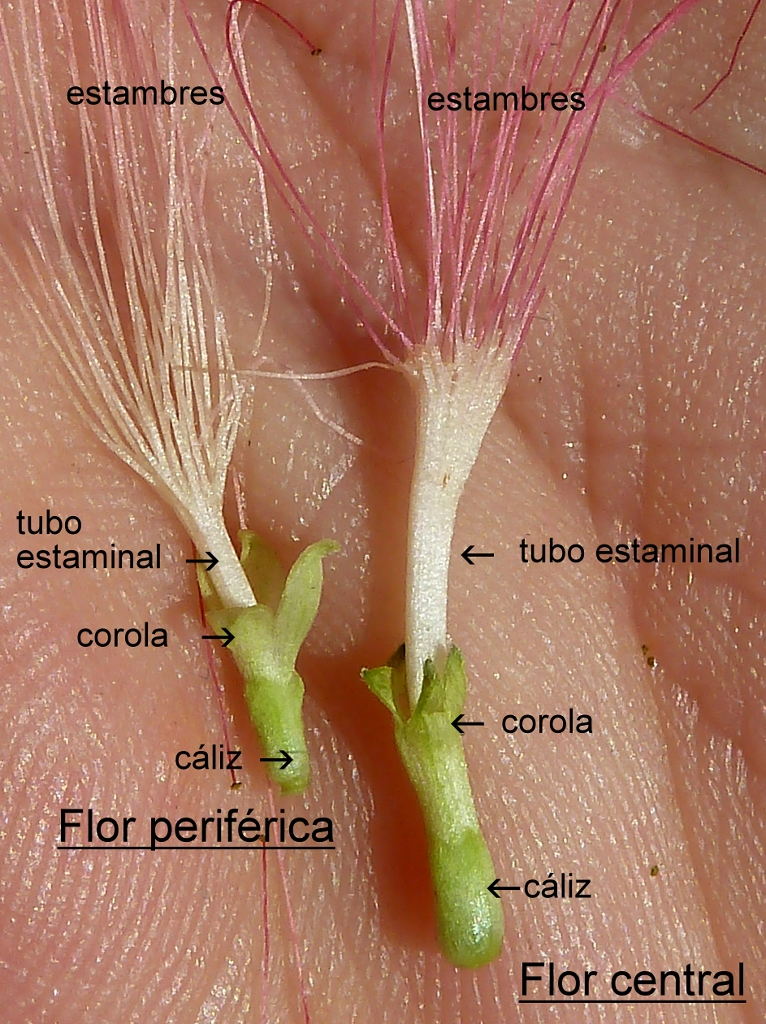 Albizia julibrissin (Acacia de Constantinopla) : Flores, detalle - Cultivado/ornamental, calle Narváez, Madrid (España).